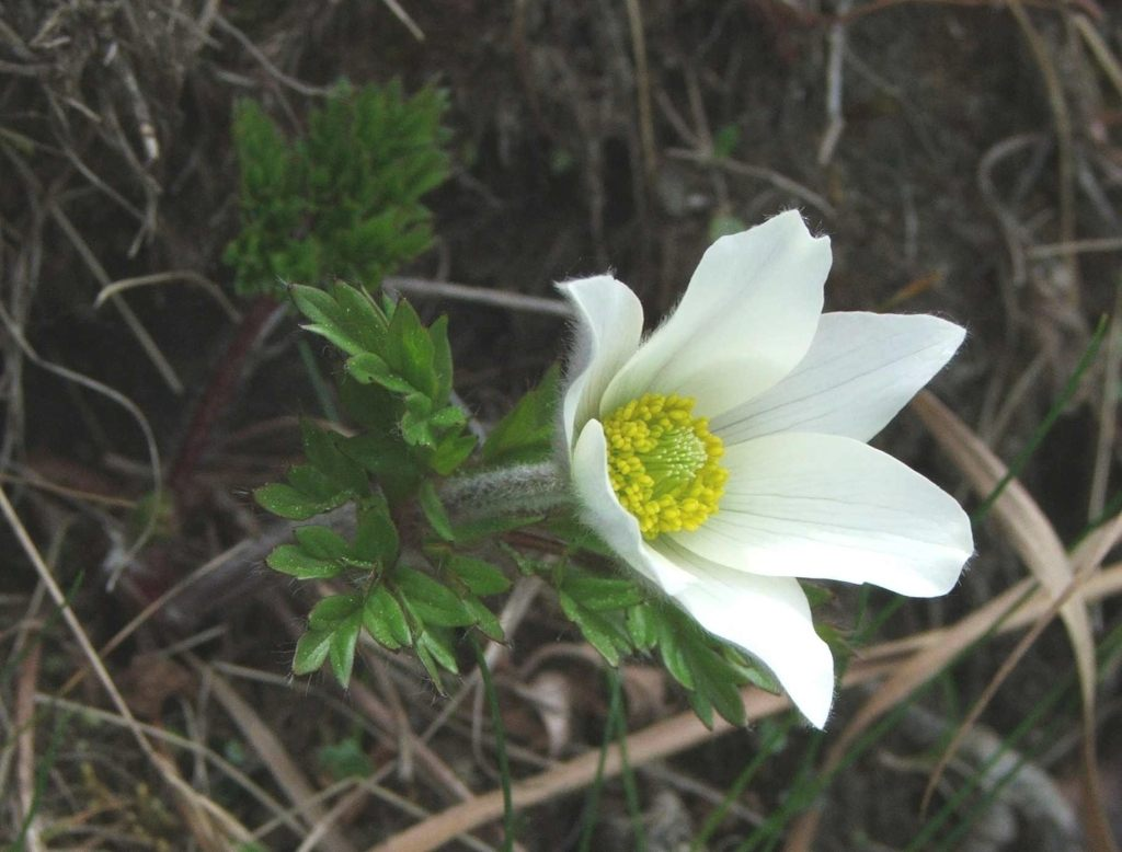 Sasanka alpejska (Pulsatilla alpina) Miejsce: Babia Góra Autor:Jerzy Opioła